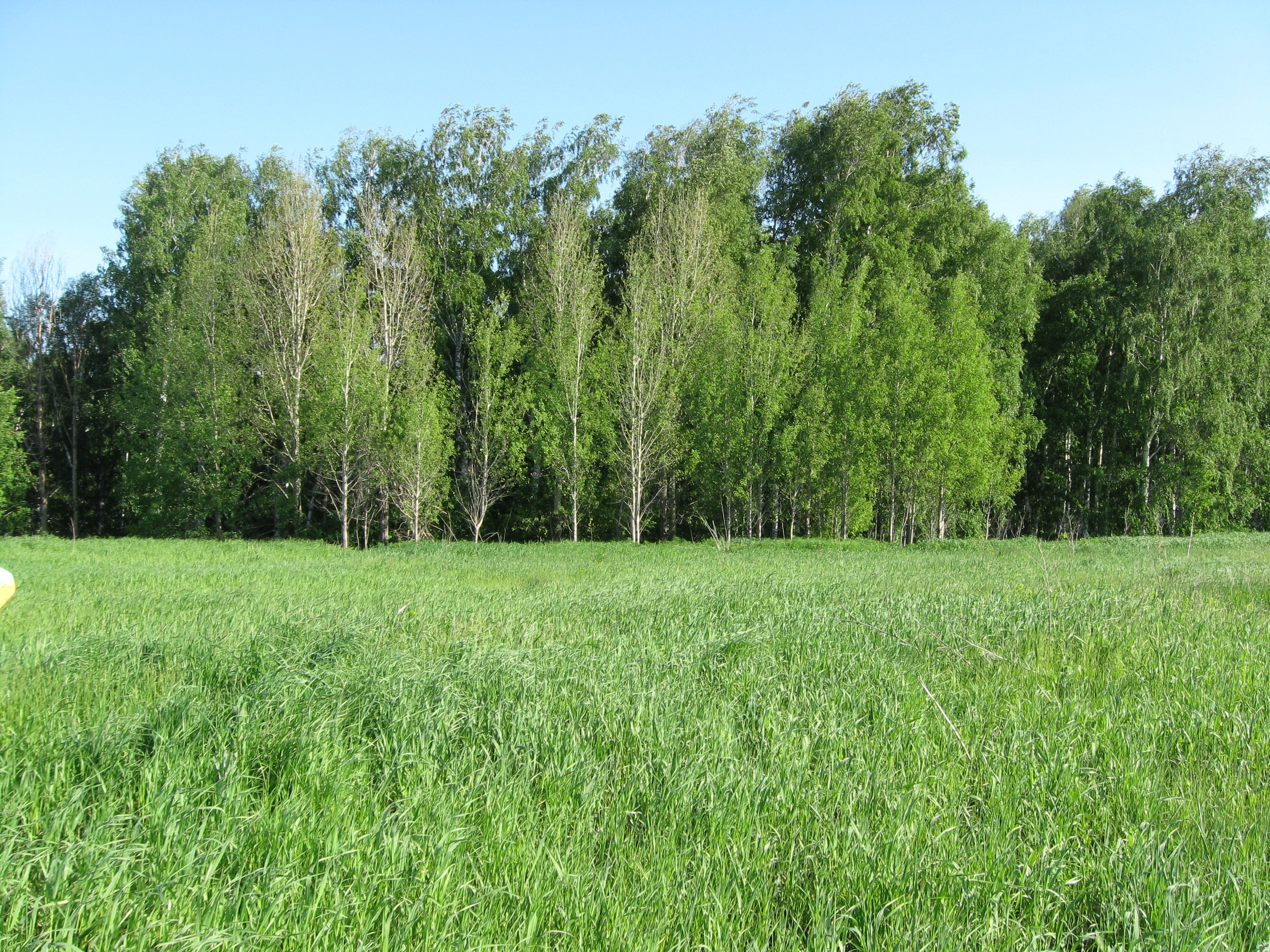 Kytmanovsky District, Altai Krai, Russia